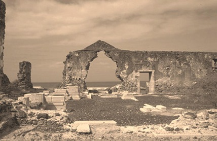 Ruínas da Sé. Cidade Velha. 1997